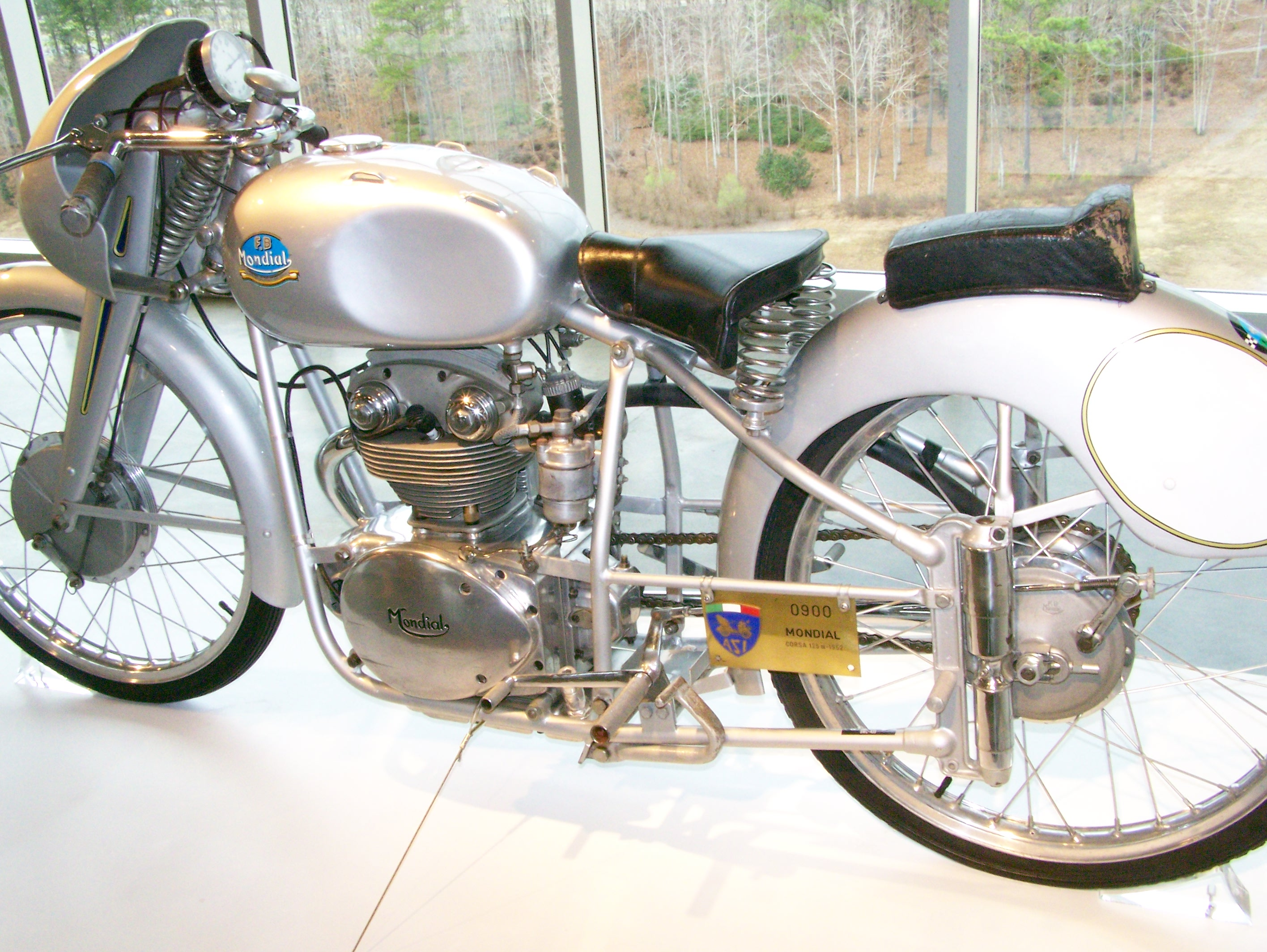 Mondial 125 Monoalbero del 1952 conservata al Barber Vintage Motorsports Museum di Birmingham